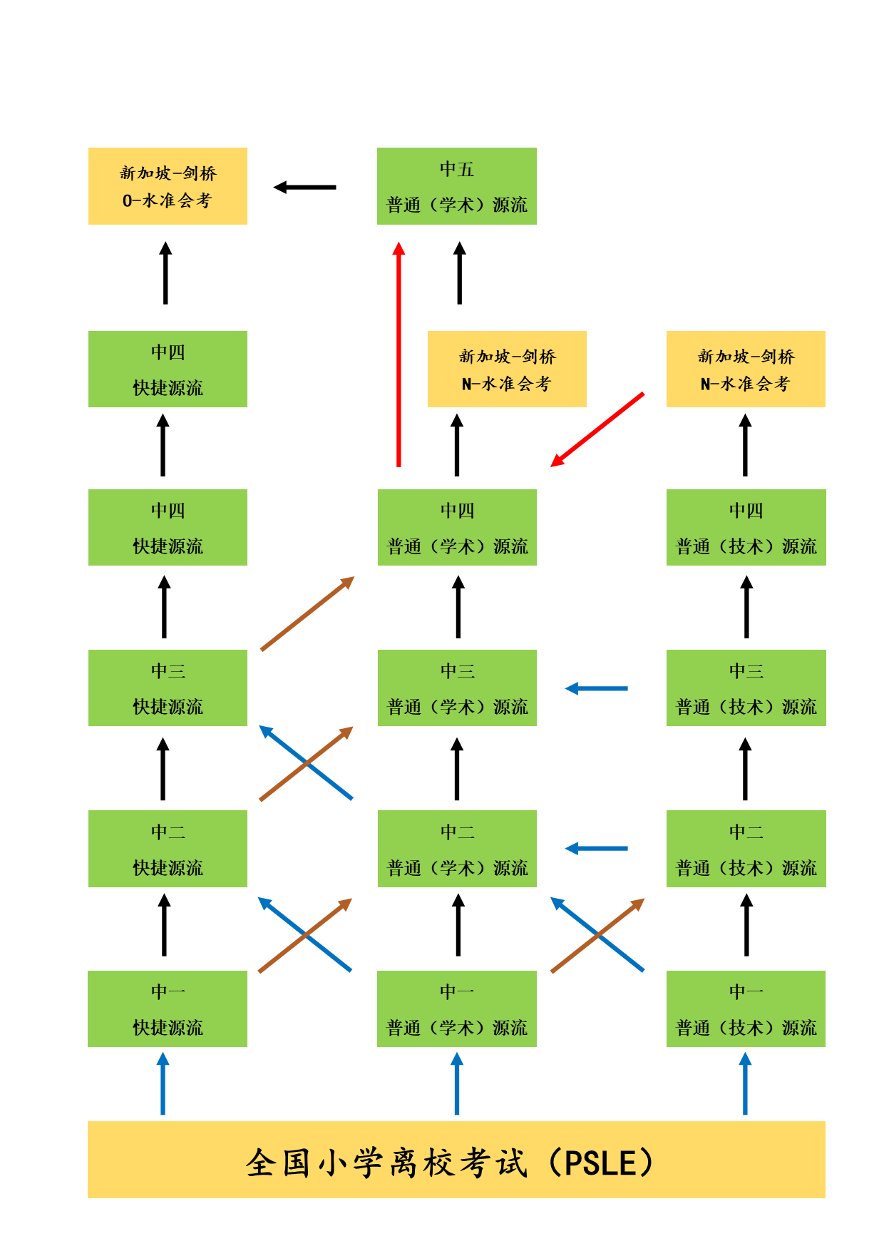 此图样简介新加坡中学教育过程中切换源流的可能途径。参见新加坡教育部网站（ .sg/education/secondary/secondary-school-courses）